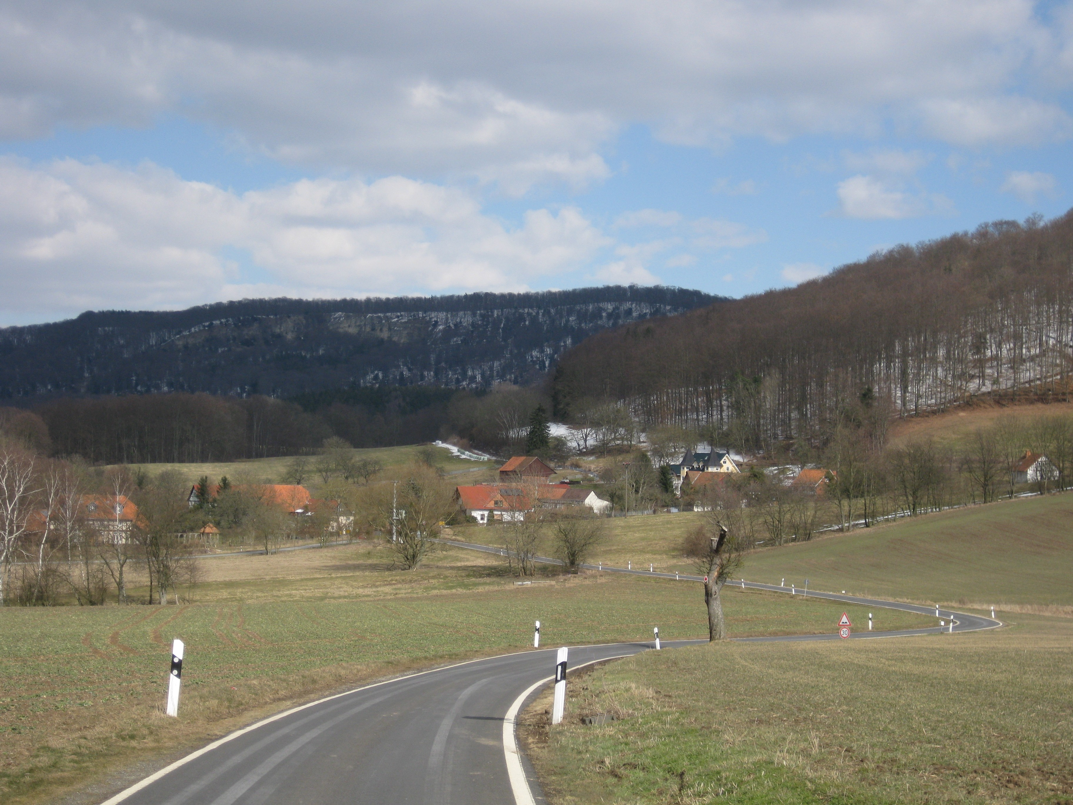 Ansicht auf Sickenberg (rechts der Lindenberg, im Hintergrund links der Dietzenröder Stein)